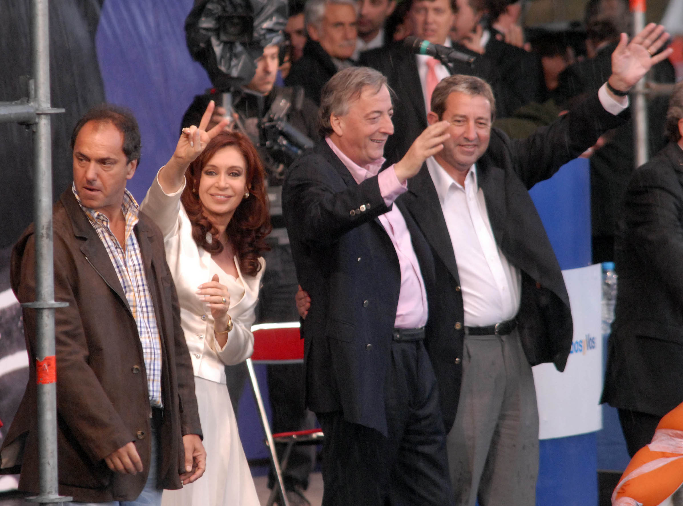 Elecciones de 2007 en Argentina, Cristina e Néstor Kirchner.